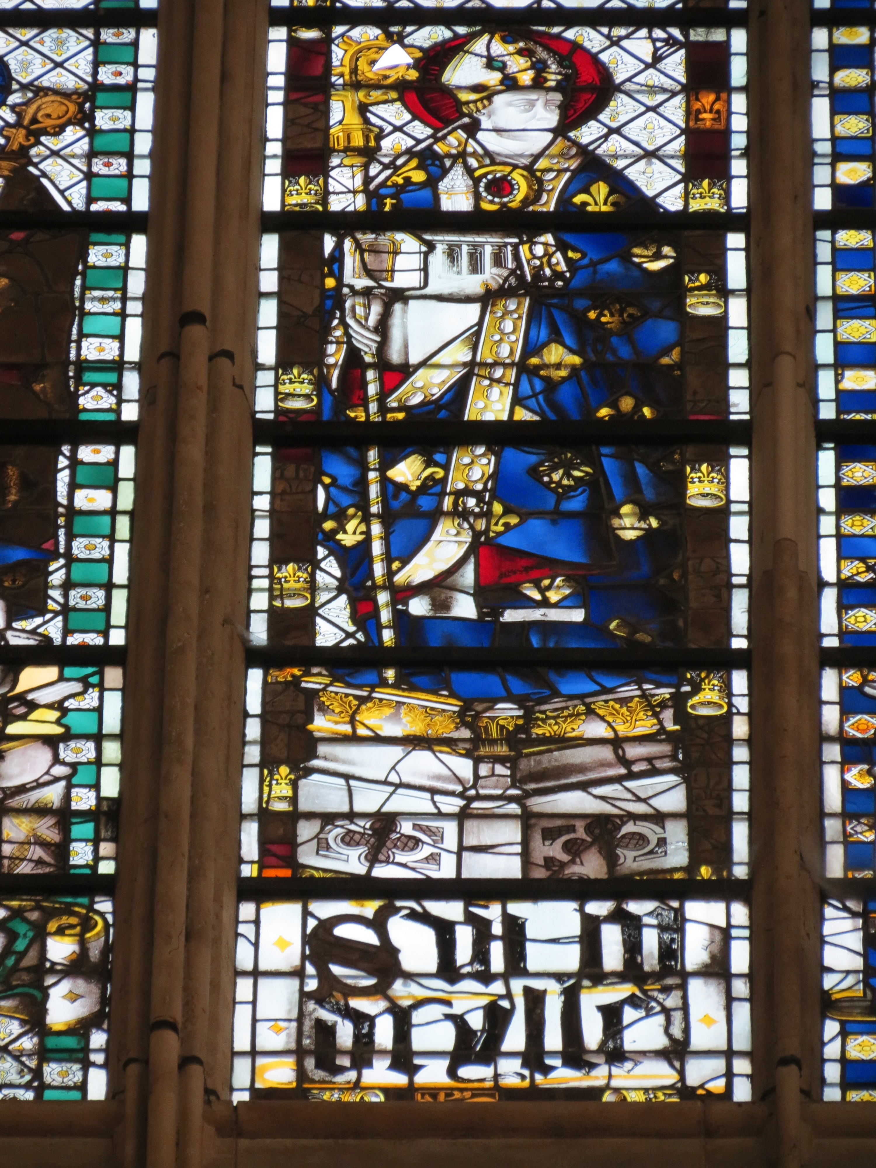 Détail de la baie du transept sud 212 de Saint-Ouen de Rouen représentant Saint-Wandrille, premier abbé de Fontenelle.